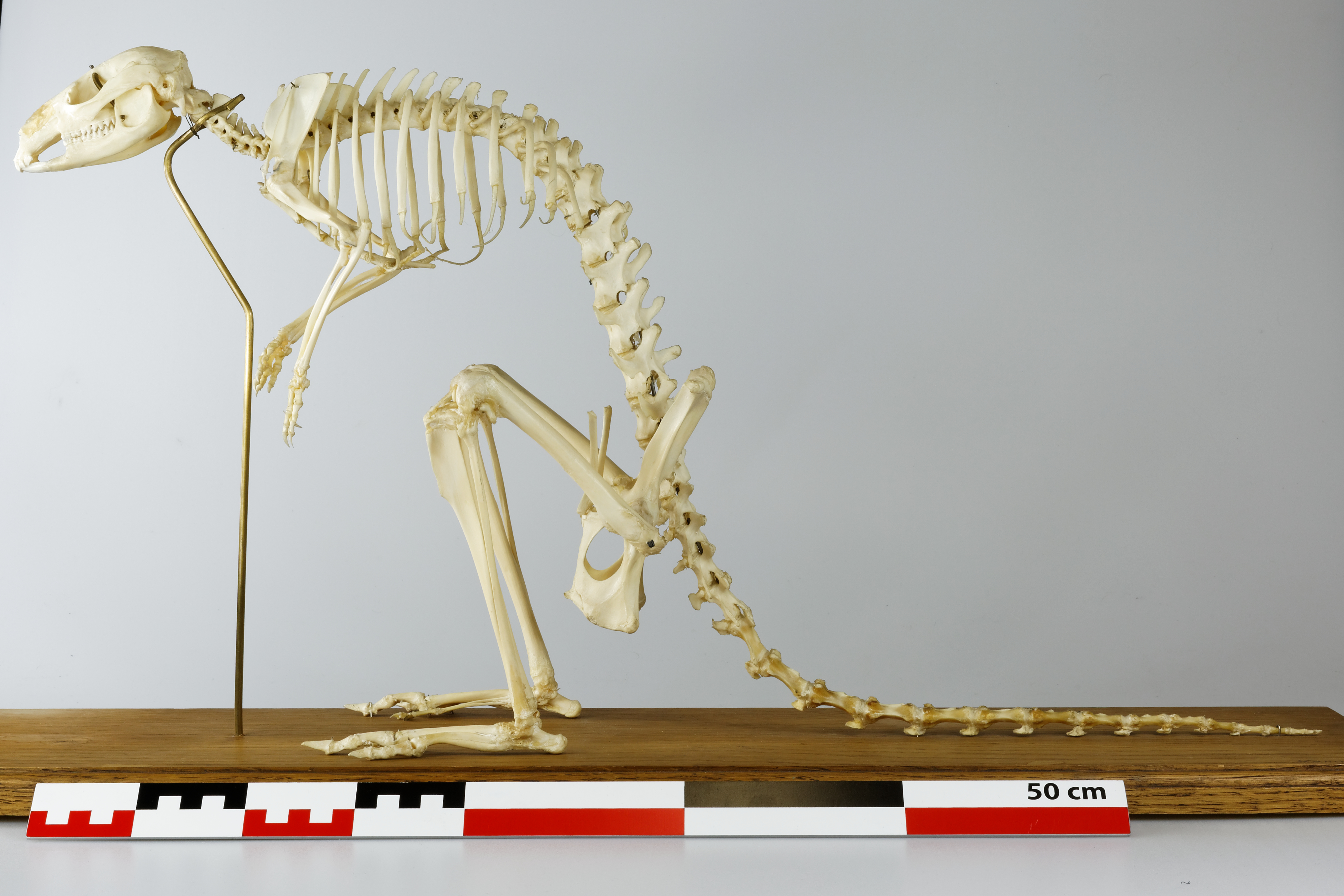 Un wallaby à cou rouge ou de Bennett - Macropus rufogriseus - de la collection de l'Université Pierre-et-Marie-Curie à Paris.